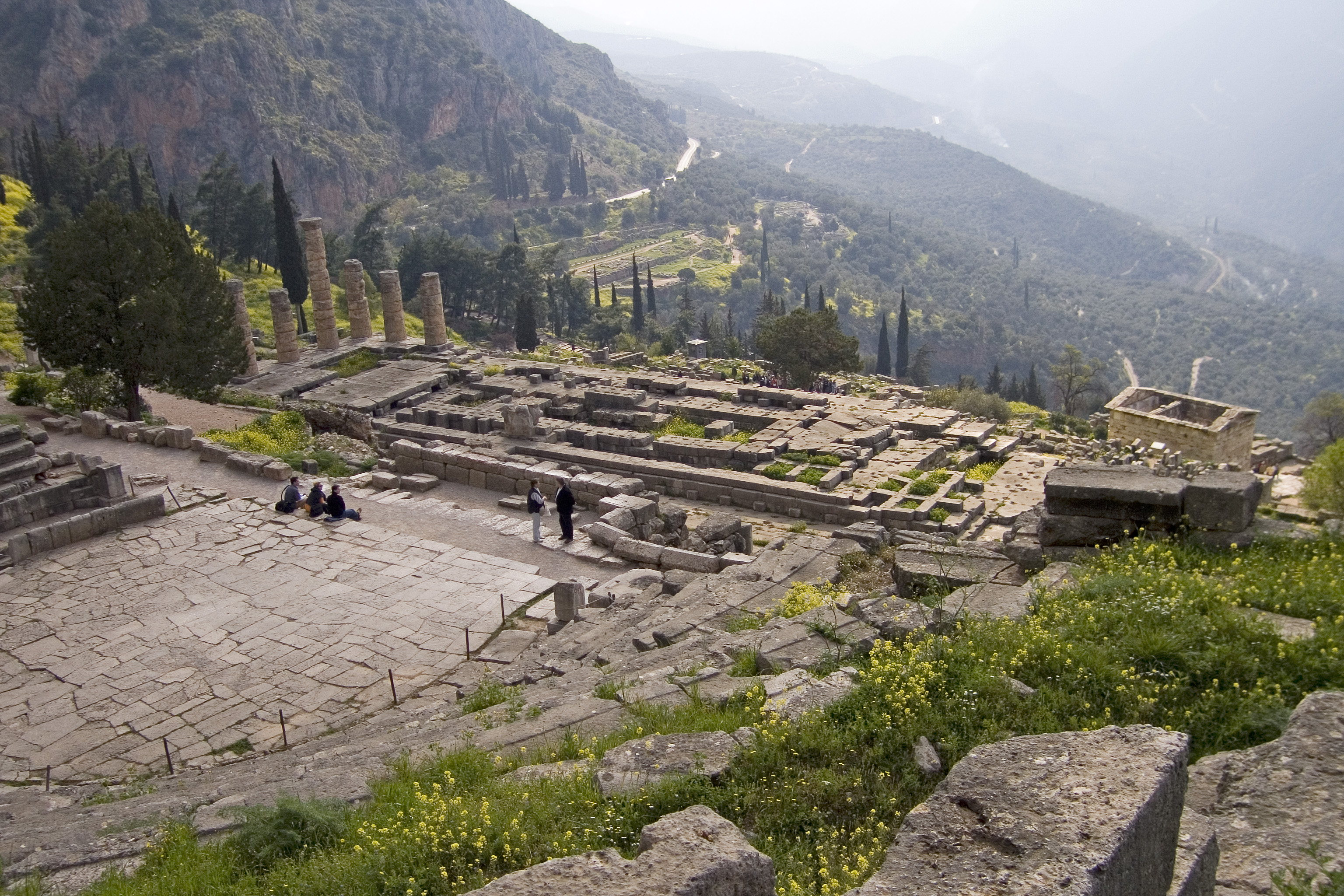 foto Sofie Debognies april 2005